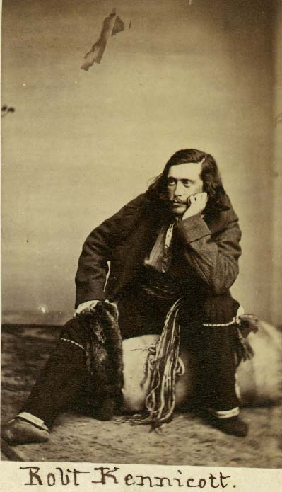 Der US-amerikanische Naturforscher Robert Kennicott (1835-1866)